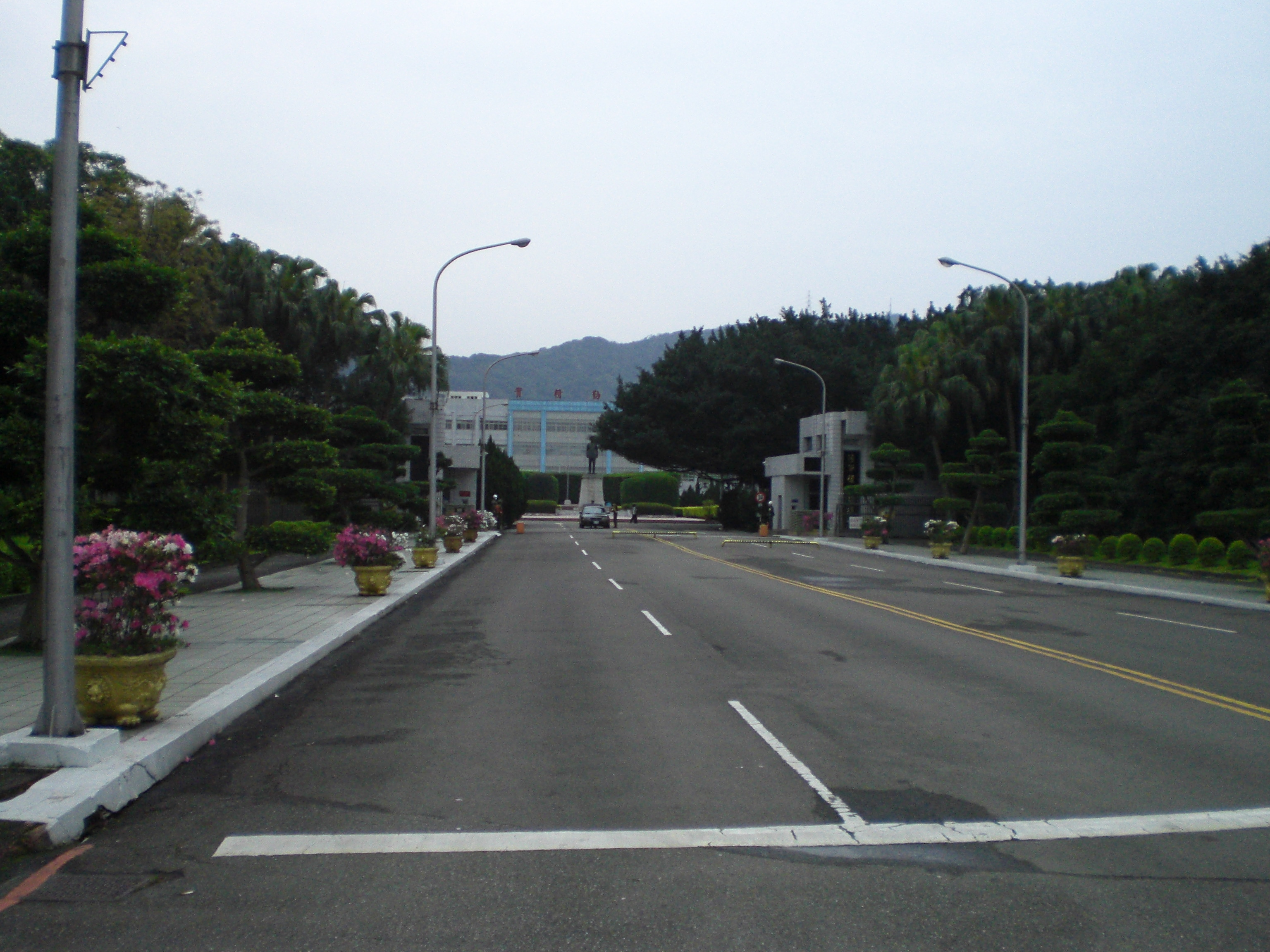 中華民國陸軍後勤指揮部，地址：臺北市南港區忠孝東路六段360號（忠勤營區）。